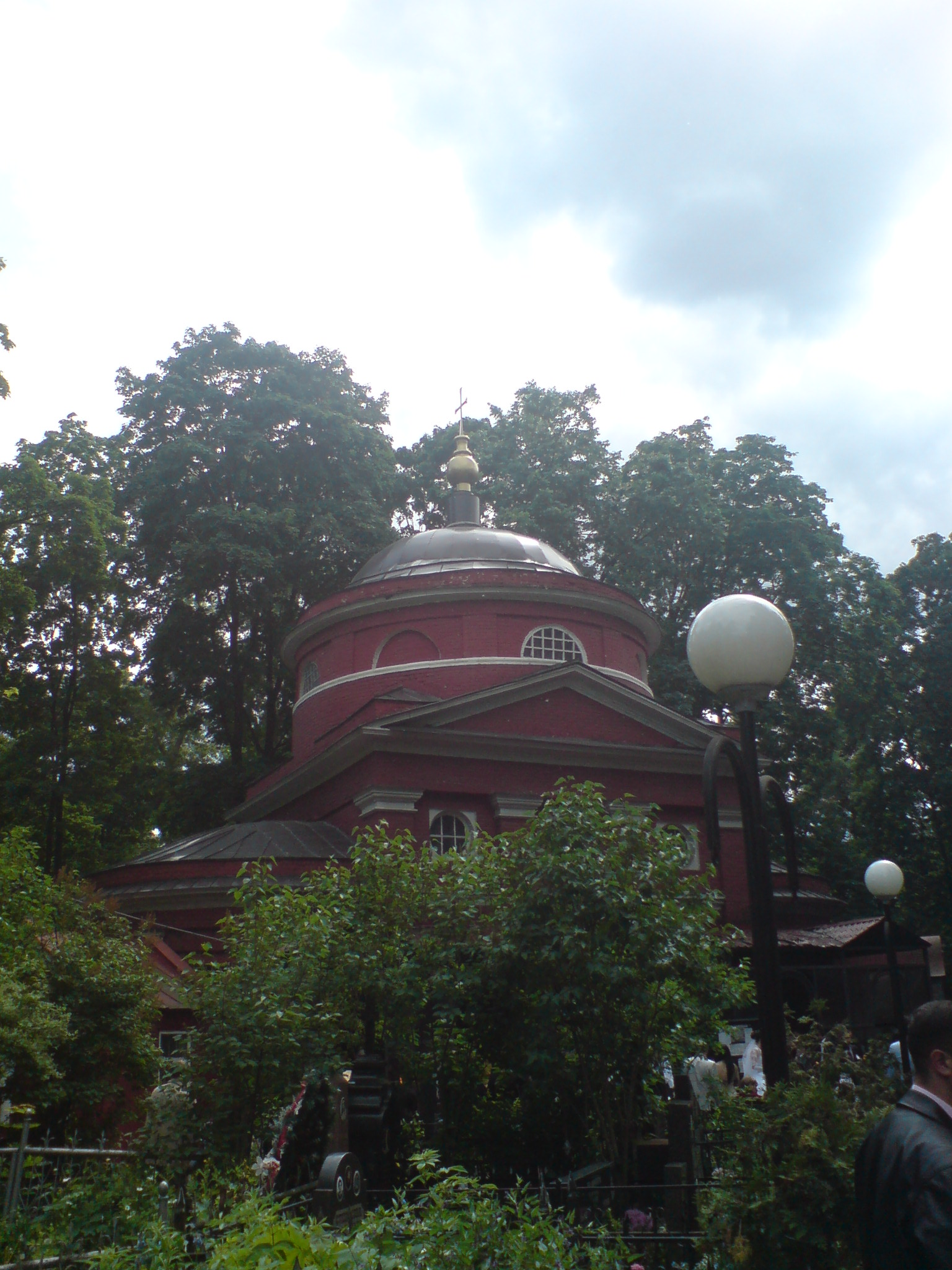 Армянская Церковь Святого Воскресения